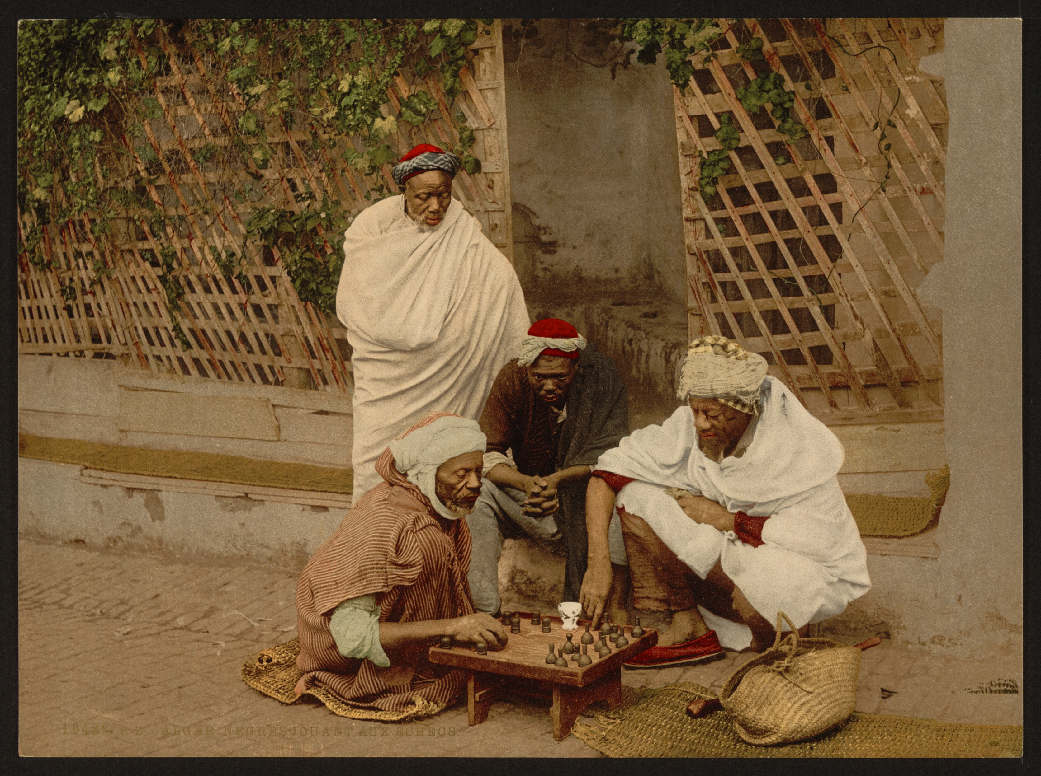 Negroes playing chess, Algiers, Algeria